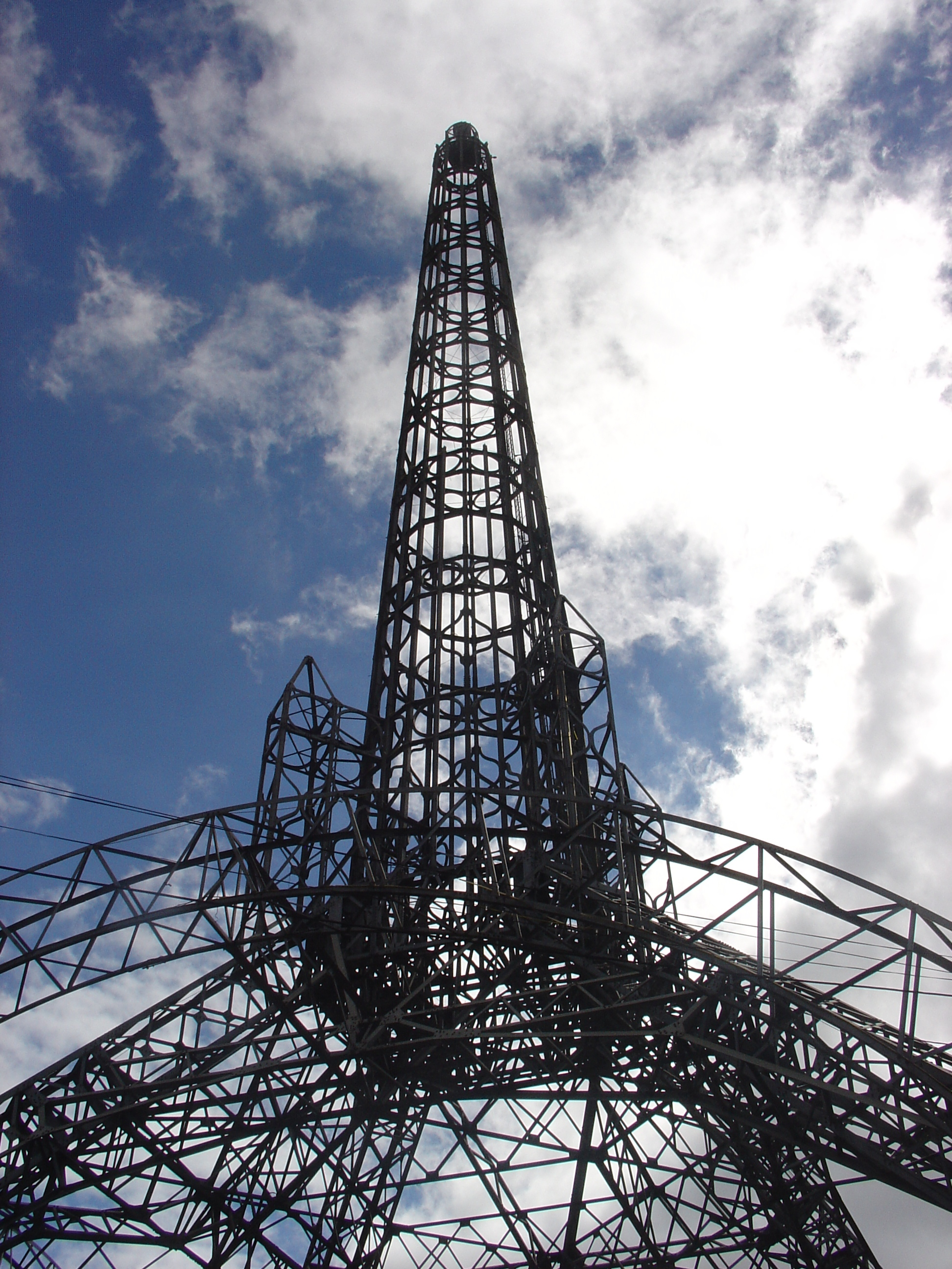 La Torre del Reformdador in Guatemala City, Guatemala